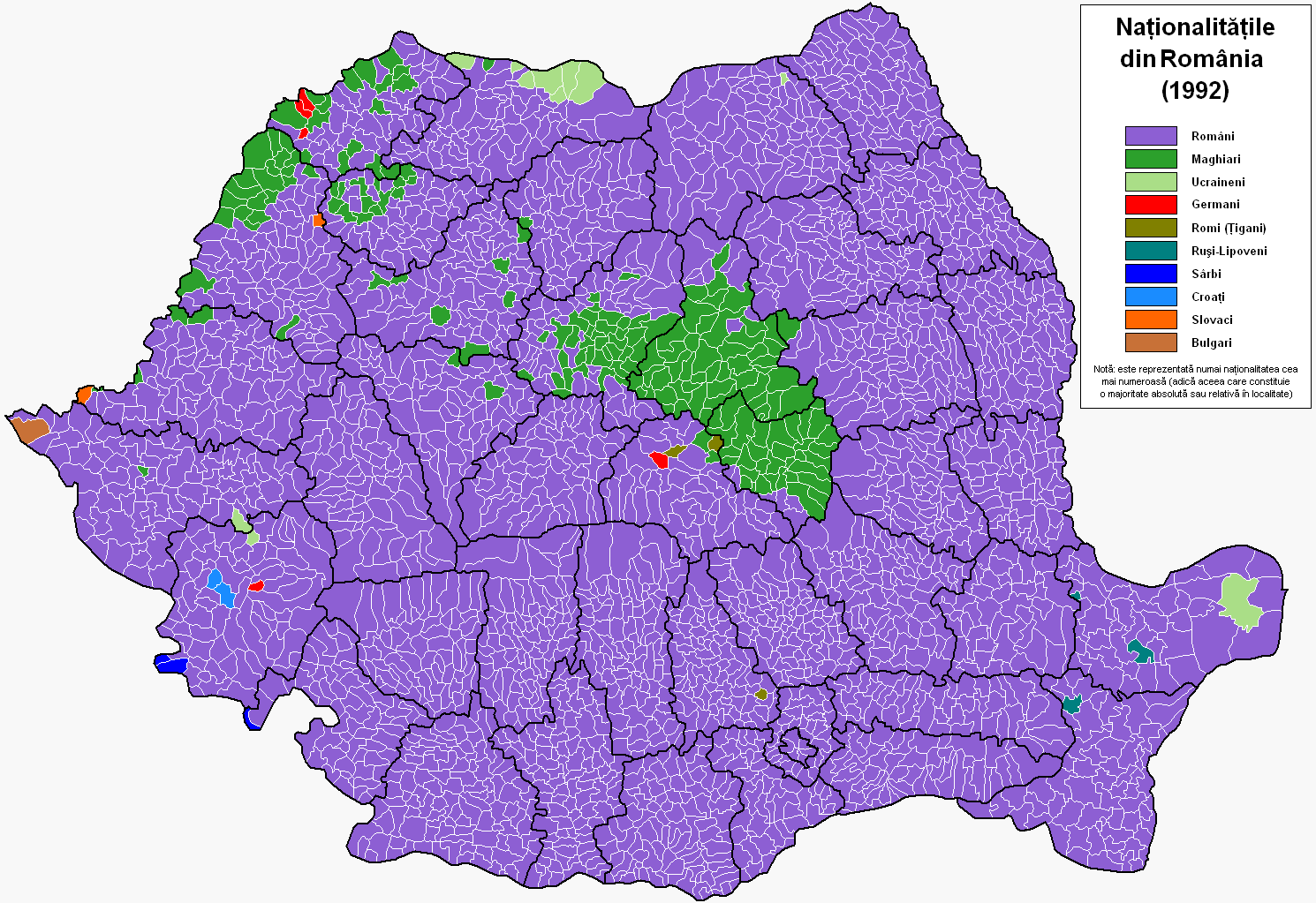 Harta etnica (1992).